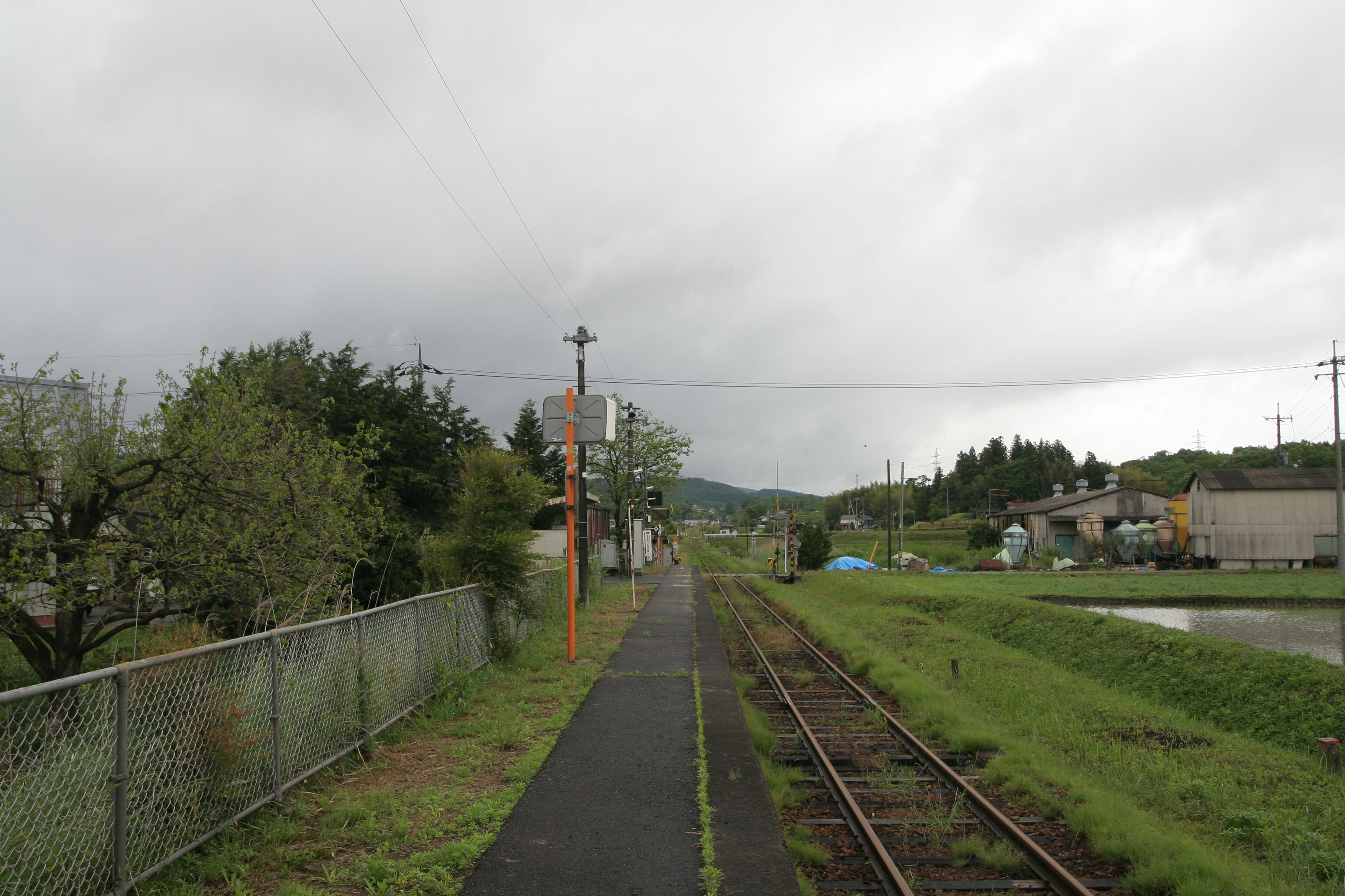 JR西日本 芸備線、七塚駅の構内